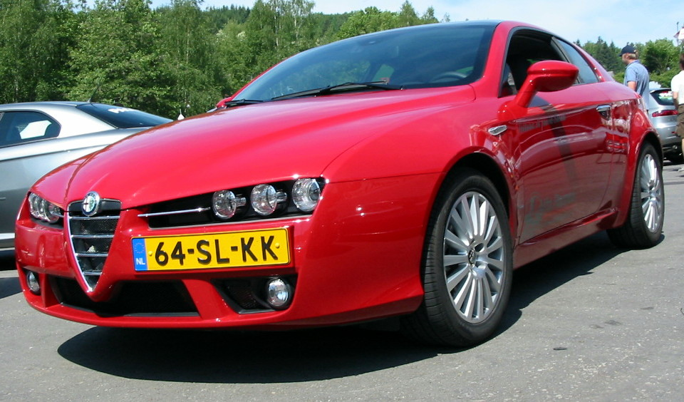 Alfa Romeo Brera